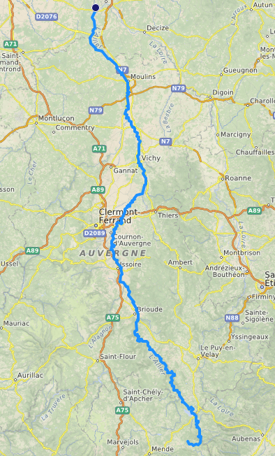 carte réalisée sur umap, [1] This map may be incomplete, and may contain errors. Don't rely solely on it for navigation.